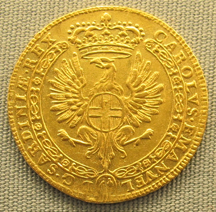 Piemonte, 4 zecchini di carlo emanuele III di savoia, 1745